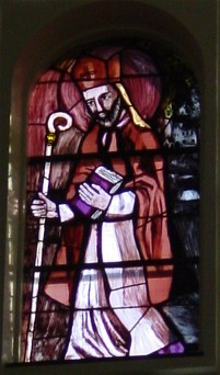 eines der 32 Kirchenfenster in der Pfarrkirche Liesing (Wien23) gestaltet von Martin Häusle. Zeigt den hl. Modestus von Kärnten selbst fotografiert Erstellungssatum: März 2007